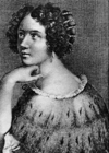 Elena Lucrezia Cornaro Piscopia, zeitgenössische Darstellung der 1684 verstorbenen italienischen Philosophin